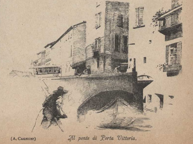 Il ponte di Porta Vittoria tratto da l naviglio : strenna del Pio Istituto dei Rachitici di Milano